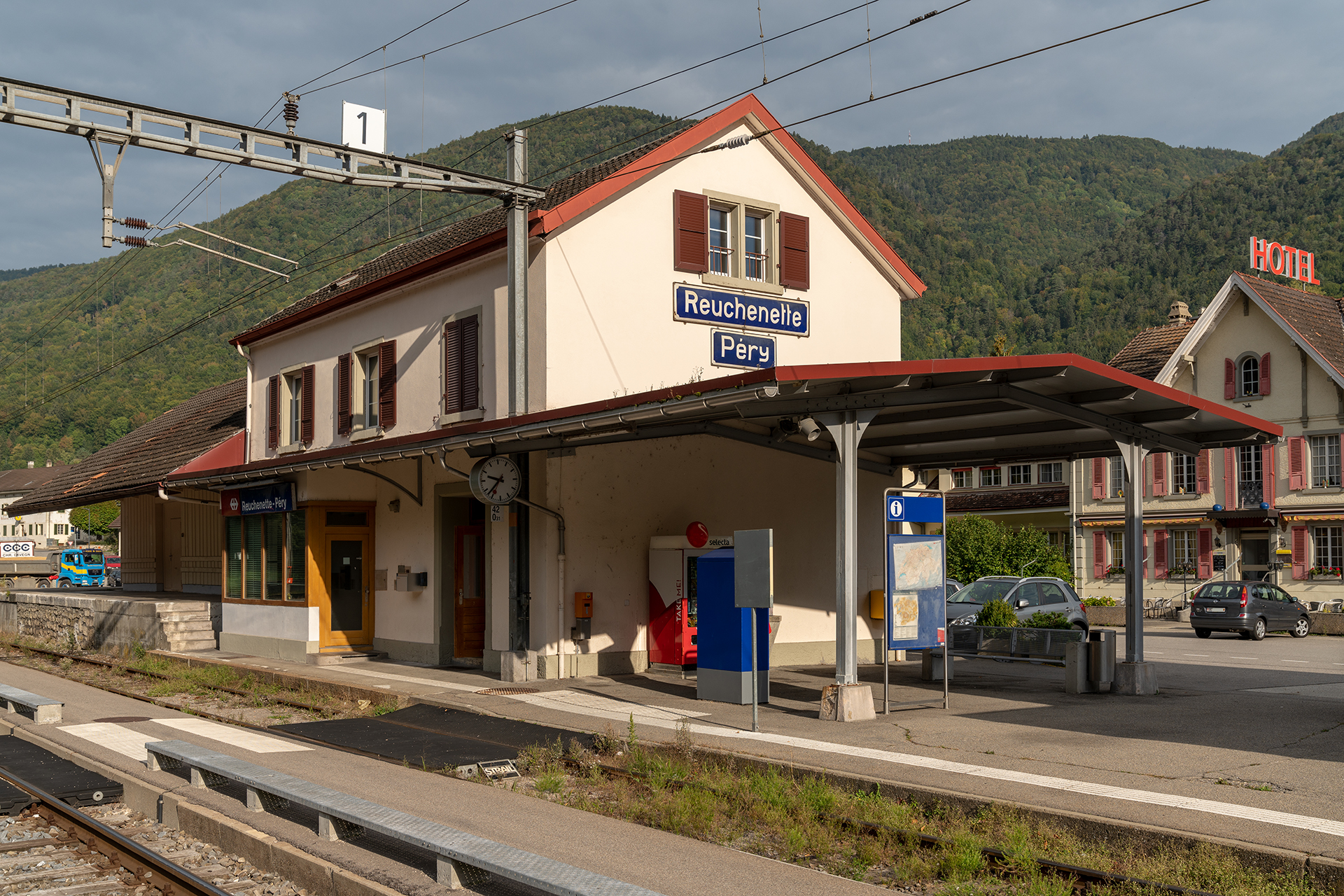 Bahnhof CFF/SBB von Péry-Reuchenette (BE)